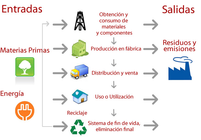 ecodiseño